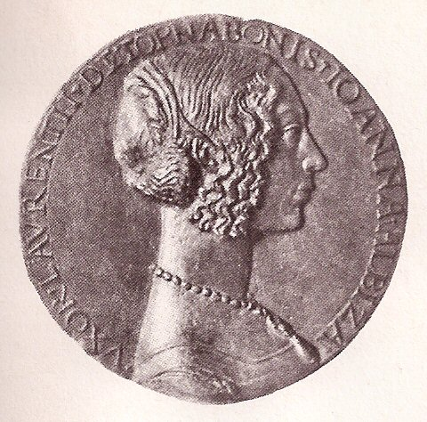 Avers de la médaille avec le portrait de Giovanna Tornabuoni